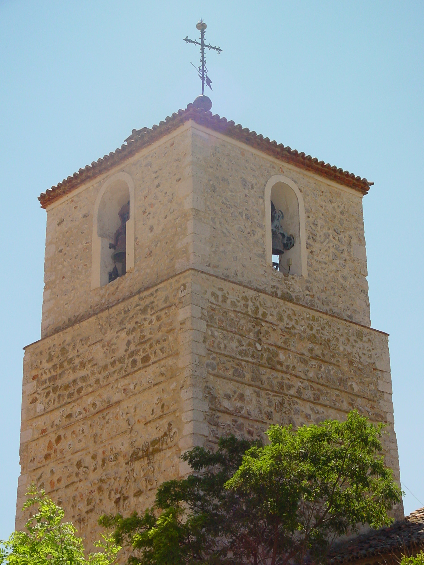 Torre de la iglesia parroquial de Pezuela de las Torres.